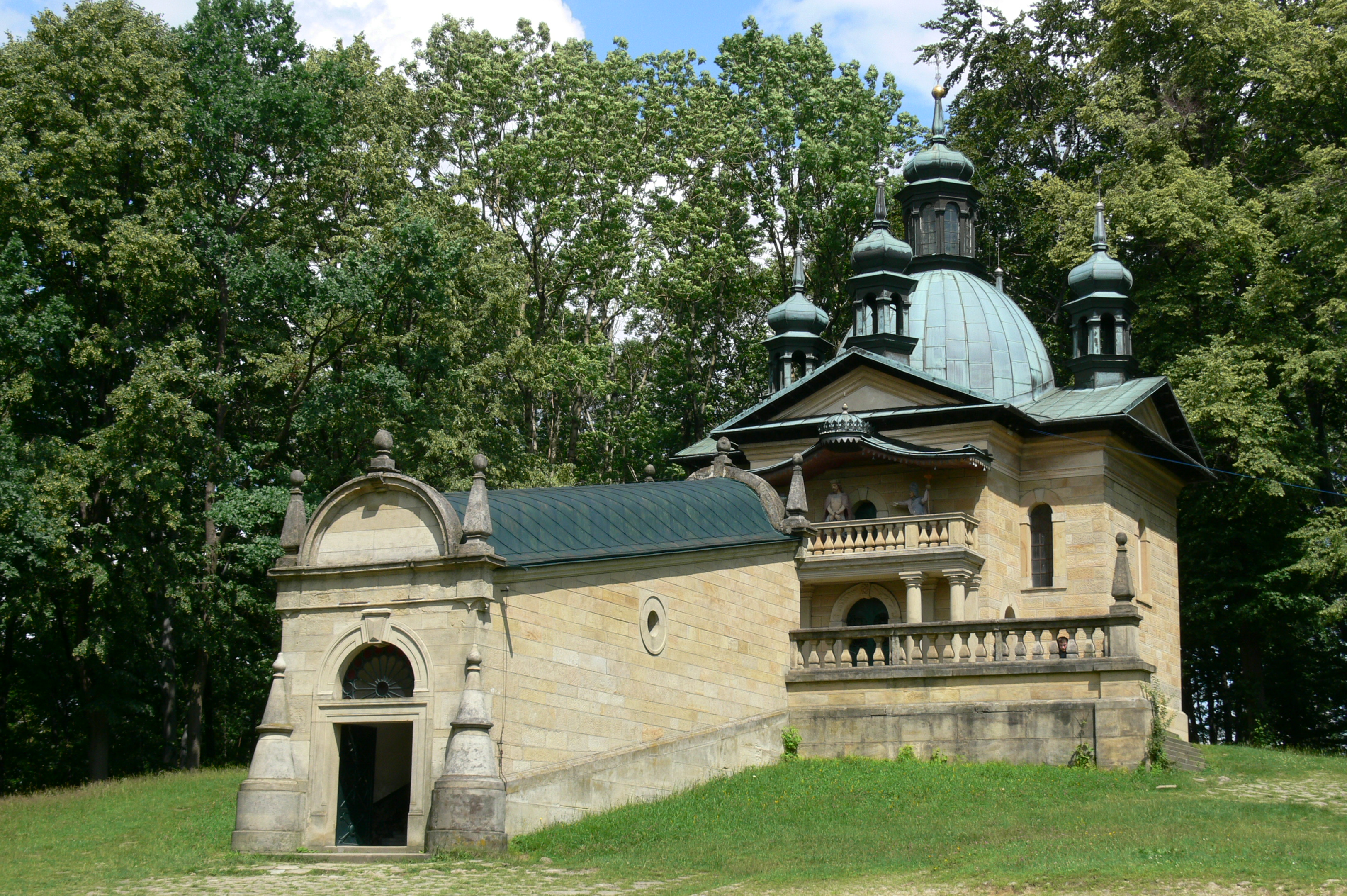 Kalwaria Zebrzydowska Dom Piłata, woj. małopolskie, pow. wadowicki A-739 -Magkrys